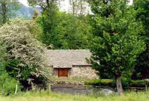 Description: le moulin de Blanlhac Licence